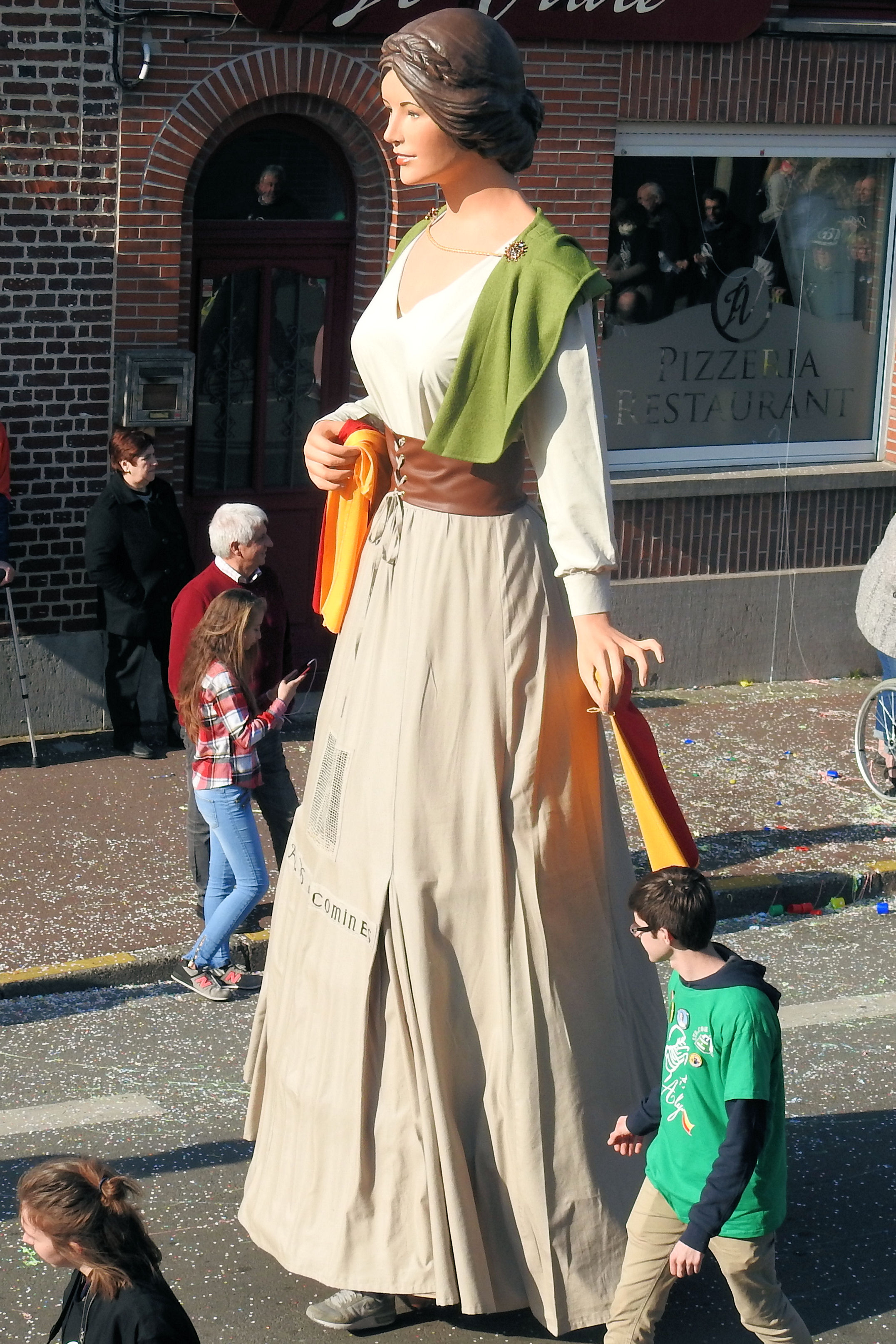 Alys de Comines ,géant cominois baptisé le 13 mars 2016